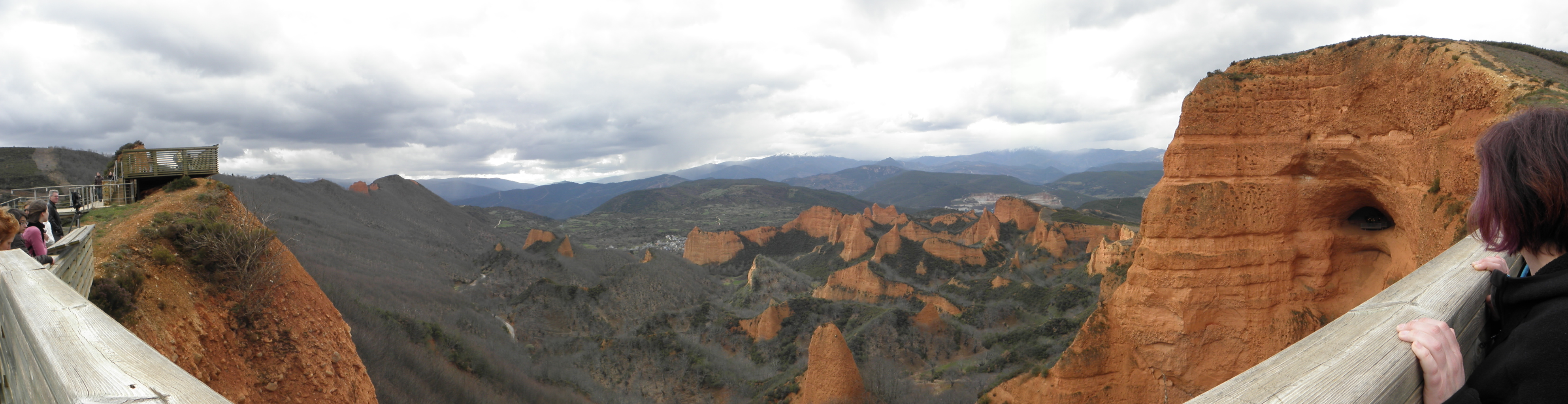 Las Médulas, el Bierzo